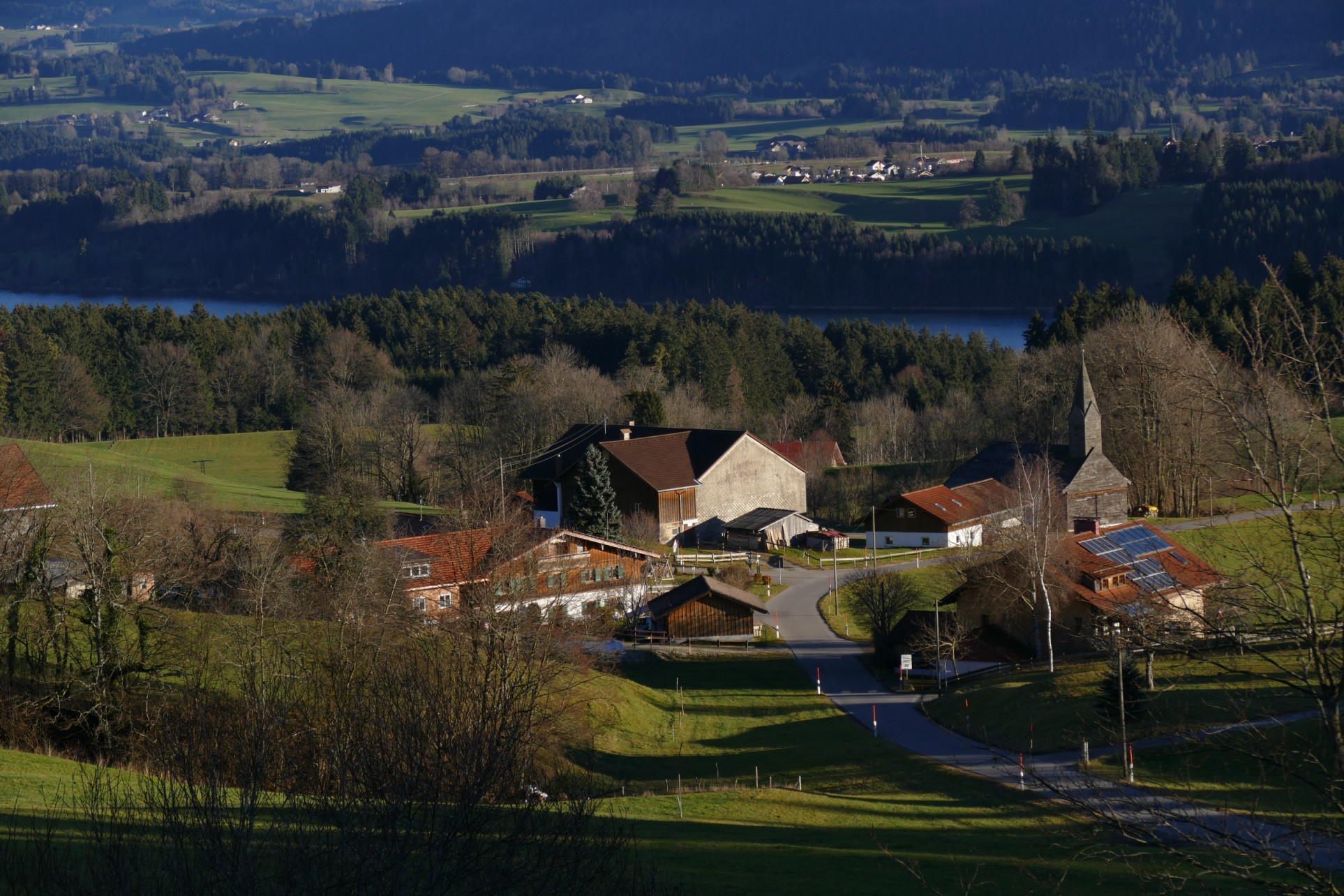 Blick auf Teile von Linsen mit Niedersonthofener See vom Stoffelberg